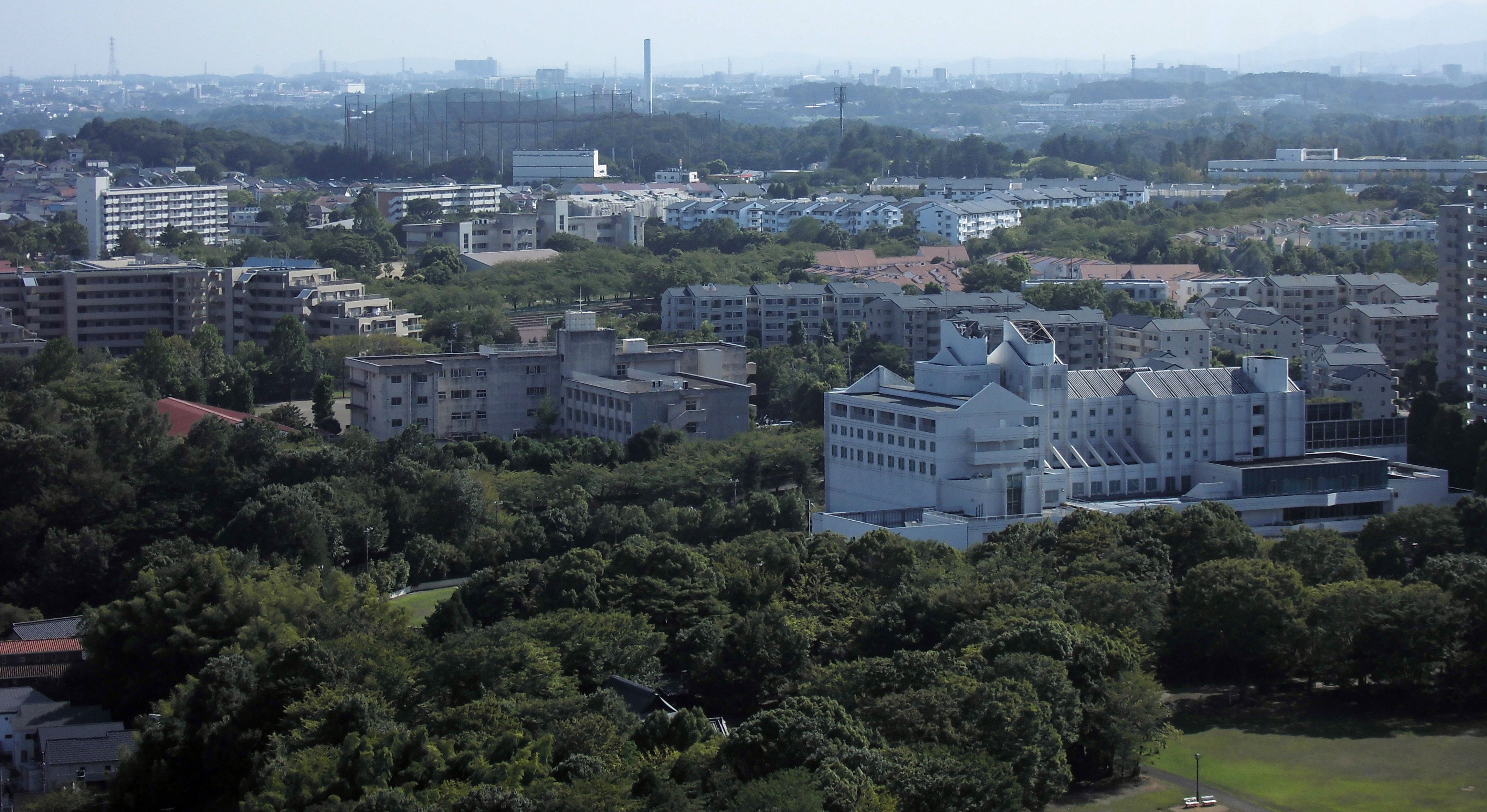 多摩センターの住宅街130819